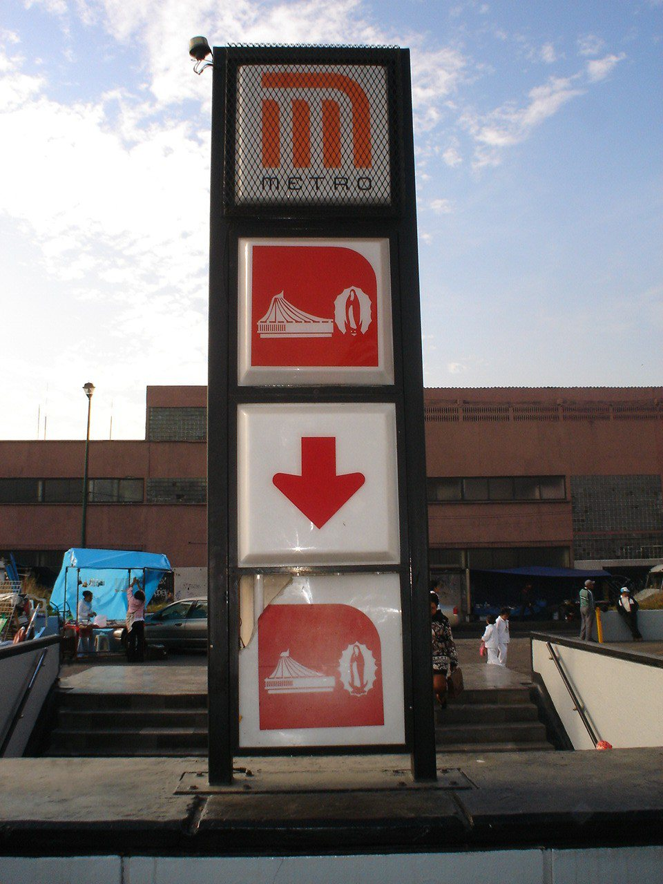 ESTACION LA VILLA-BASILICA